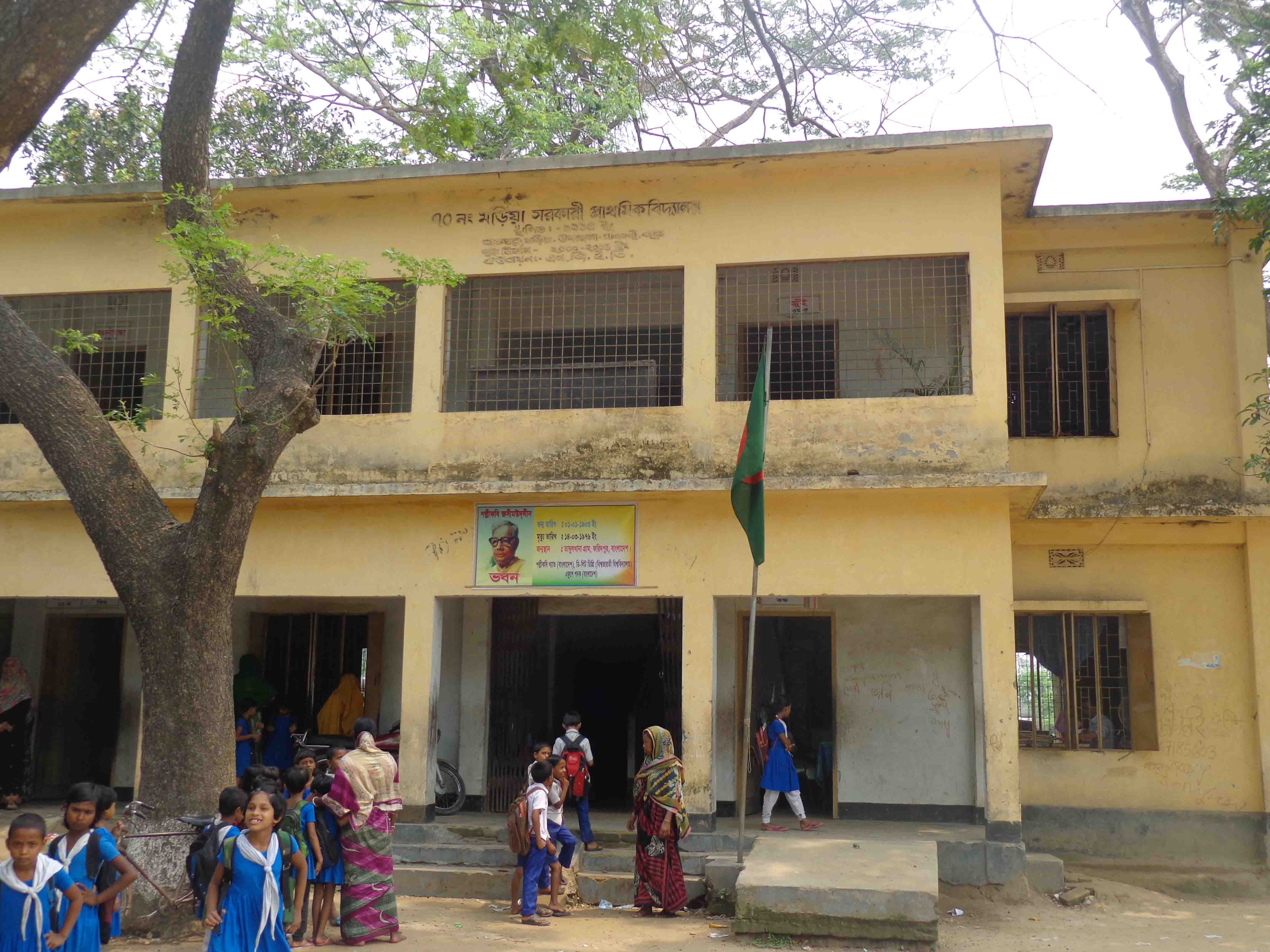 মড়িয়া সরকারী প্রাথমিক বিদ্যালয়ের ভবন